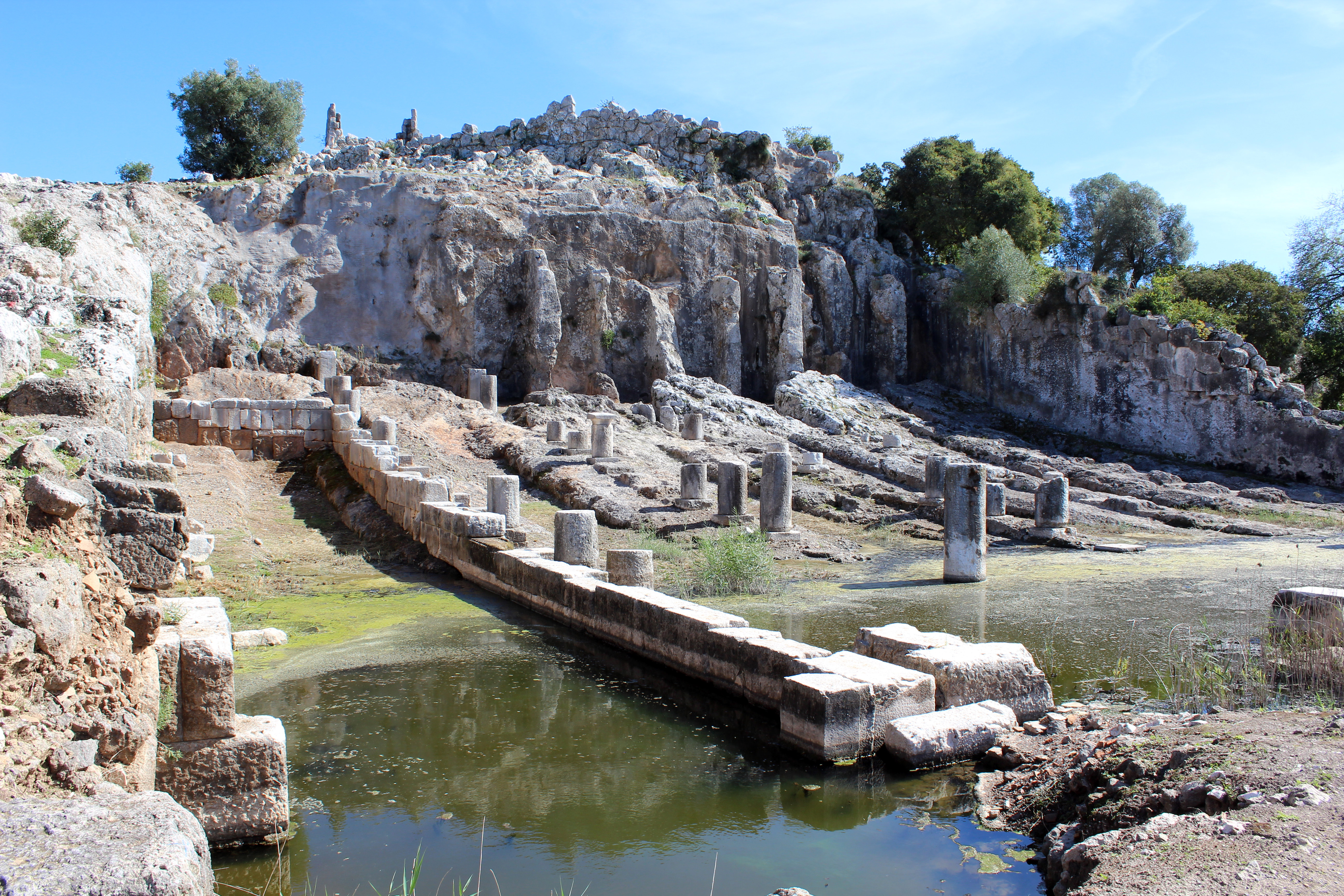 Οινιάδες«Οινιάδες»